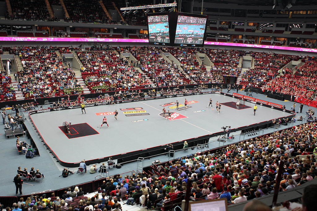 스웨덴 플로어볼 프로 경기 결승전